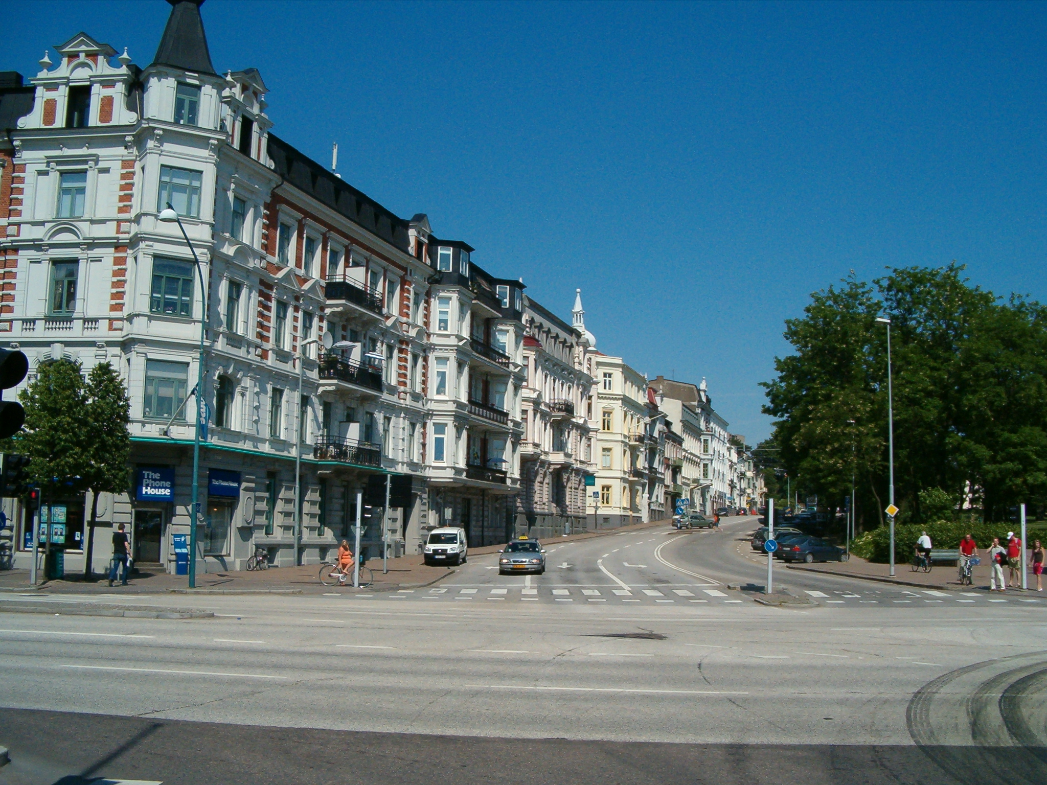 The street Trädgårdsgatan in Helsingborg, Sweden